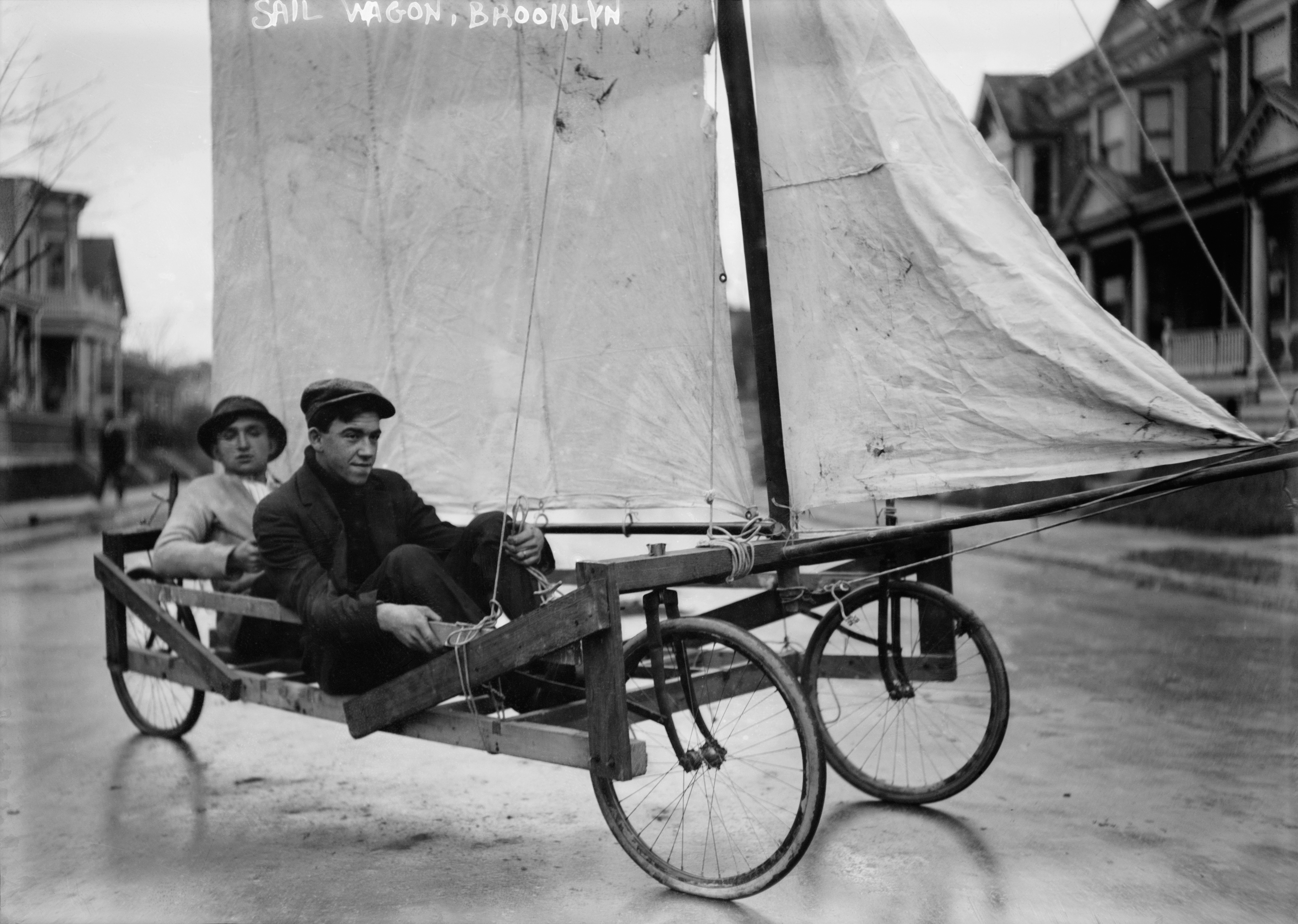 Sail Wagon, Brooklyn